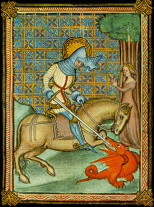 Saint Georges terrassant le dragon